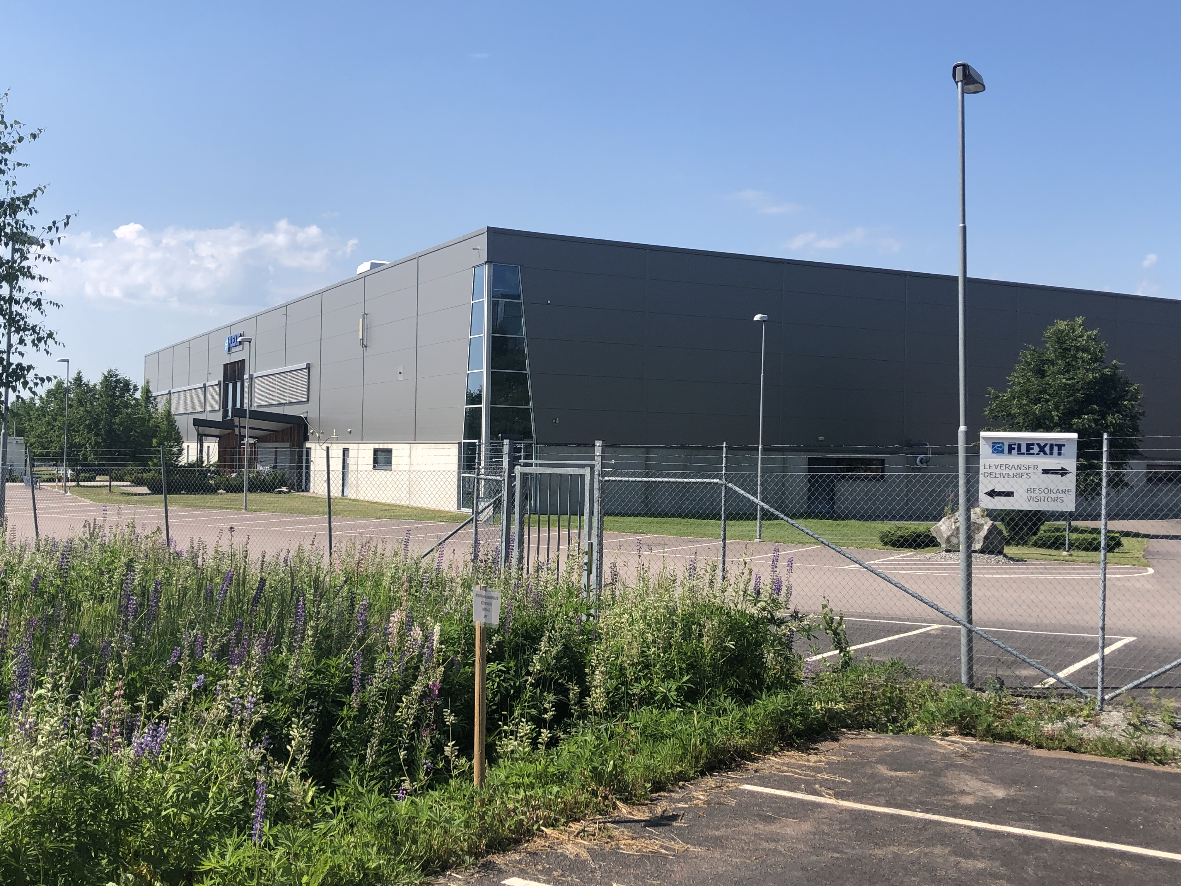 Flexits fabrik i Töcksfors, Sverige.